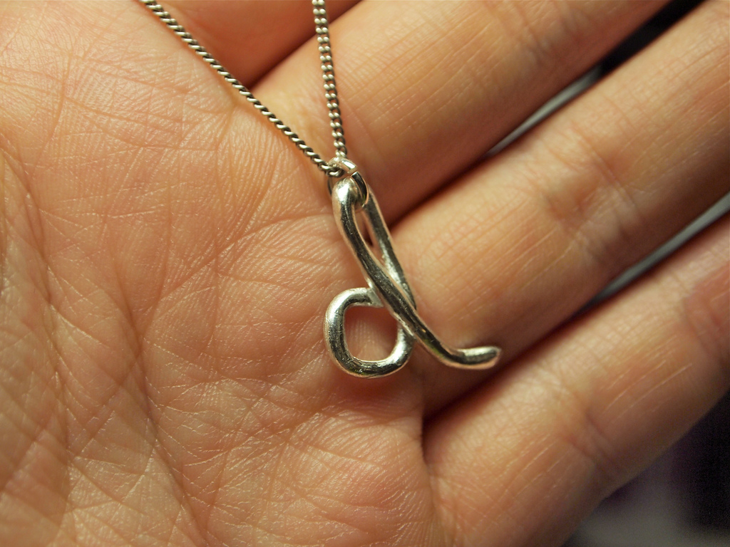 Metal clay pendant.